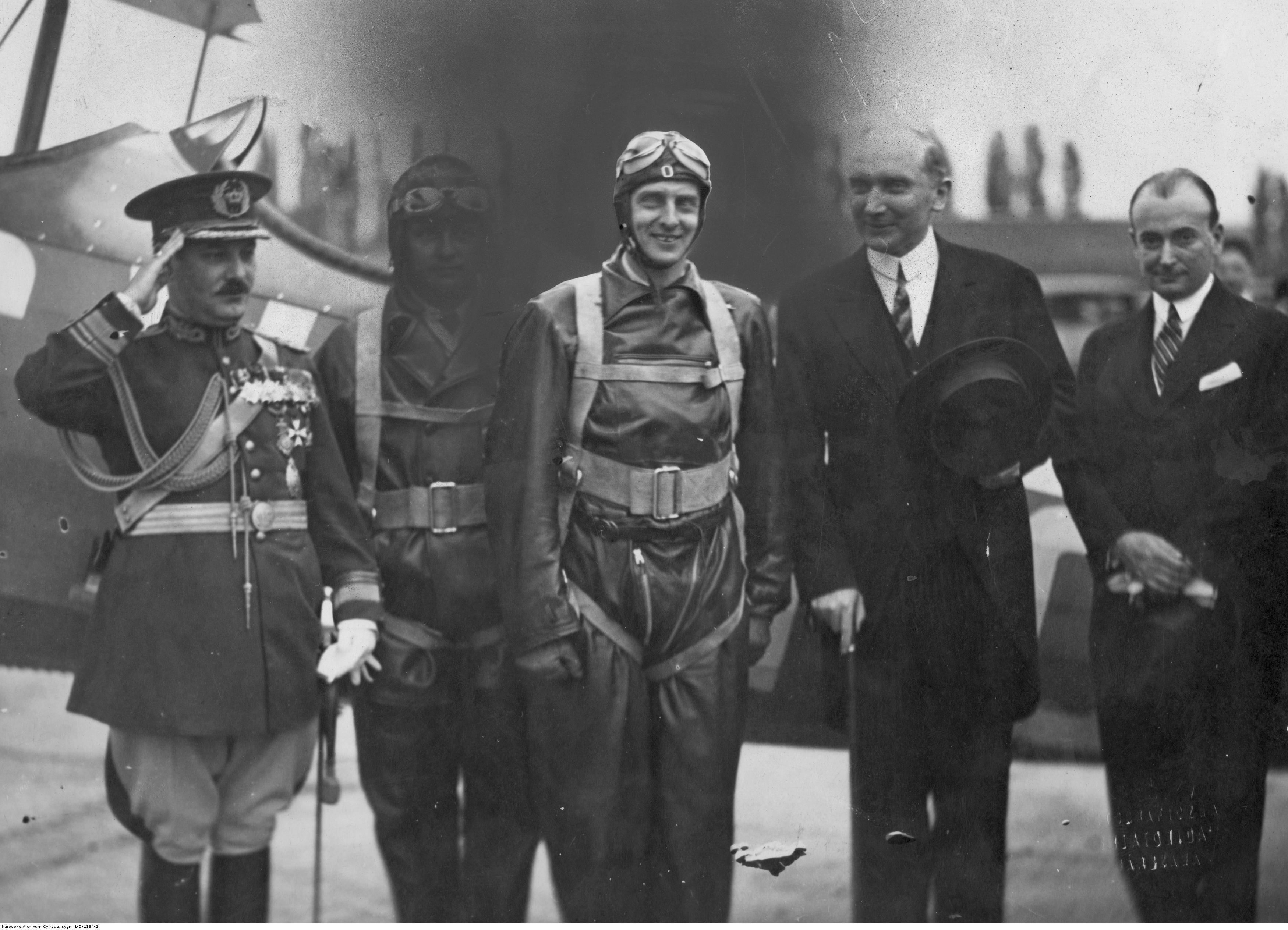 Wizyta brata króla Rumunii księcia Mikołaja w Polsce. Brat króla Rumunii książę Mikołaj (trzeci z prawej) w towarzystwie ministra spraw zagranicznych Polski Augusta Zaleskiego (drugi z prawej), pilota kpt. Oprisa (drugi z lewej) oraz attache wojskowego Poselstwa Rumunii w Warszawie płk. S. Constantina (pierwszy z lewej) na lotnisku na Polu Mokotowskim; 20 sierpień 1931. Koncern Ilustrowany Kurier Codzienny - Archiwum Ilustracji. Sygnatura: 1-D-1384-2